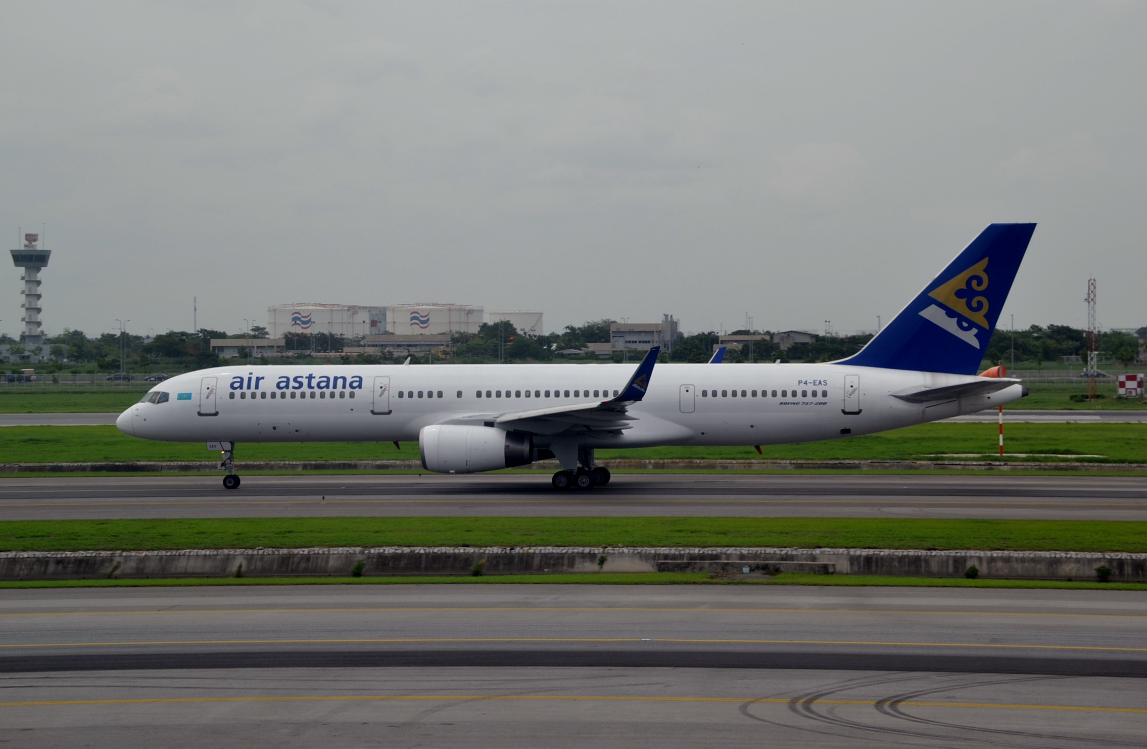 Boeing 757/2W of Air Astana at Bangkok-BKK, Thailand, 23/06/15.